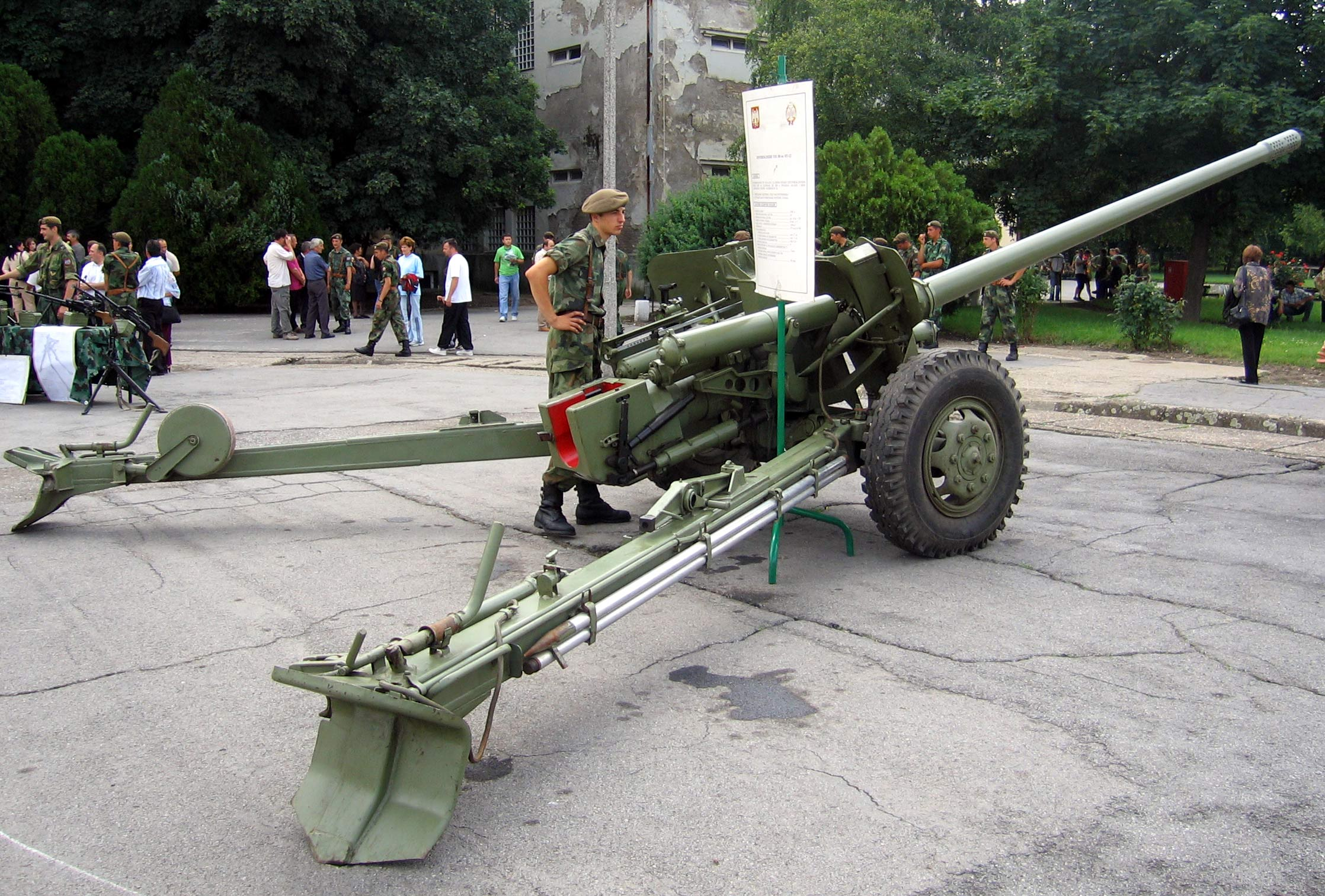 Противоклопни топ 100мм МТ-12.